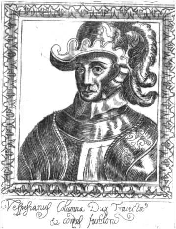 Vespasiano Colonnà (1480-1528)